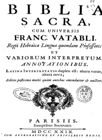 Biblia sacra: cum universis Franc. Vatabli ... et variorum interpretum ... 10 editions published between 1584 and 1729, François Vatable, Franciscus Vatablus (1495-1547)